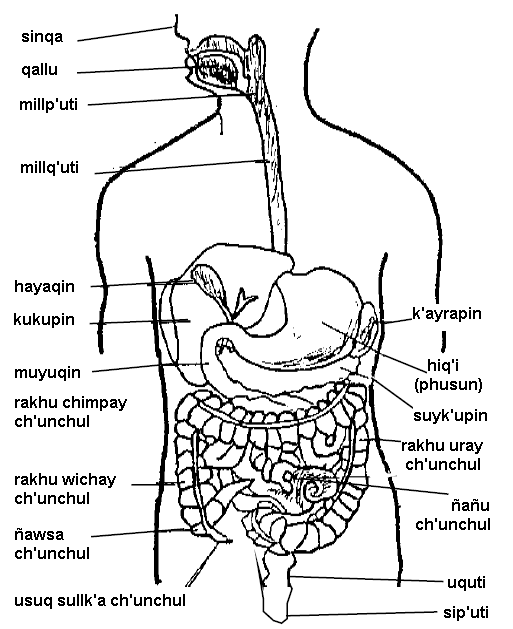 Runa Simi: Runap ñat'inkuna